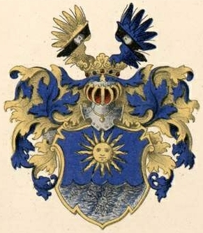 Luce suguvõsa aadlivapp